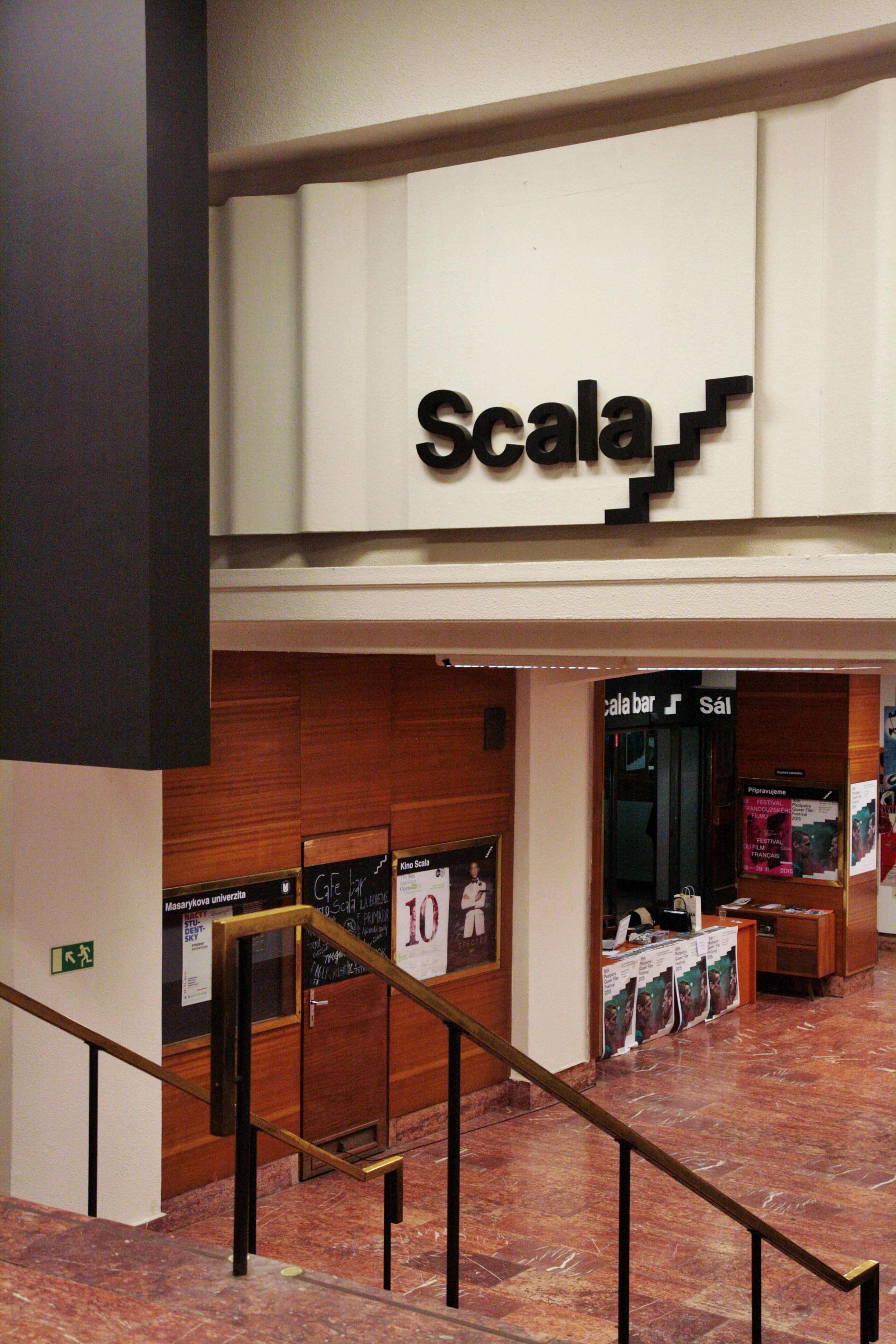 Výzdoba vstupního schodiště po úpravách, které předcházely obnovení provozu kina na podzim 2013.